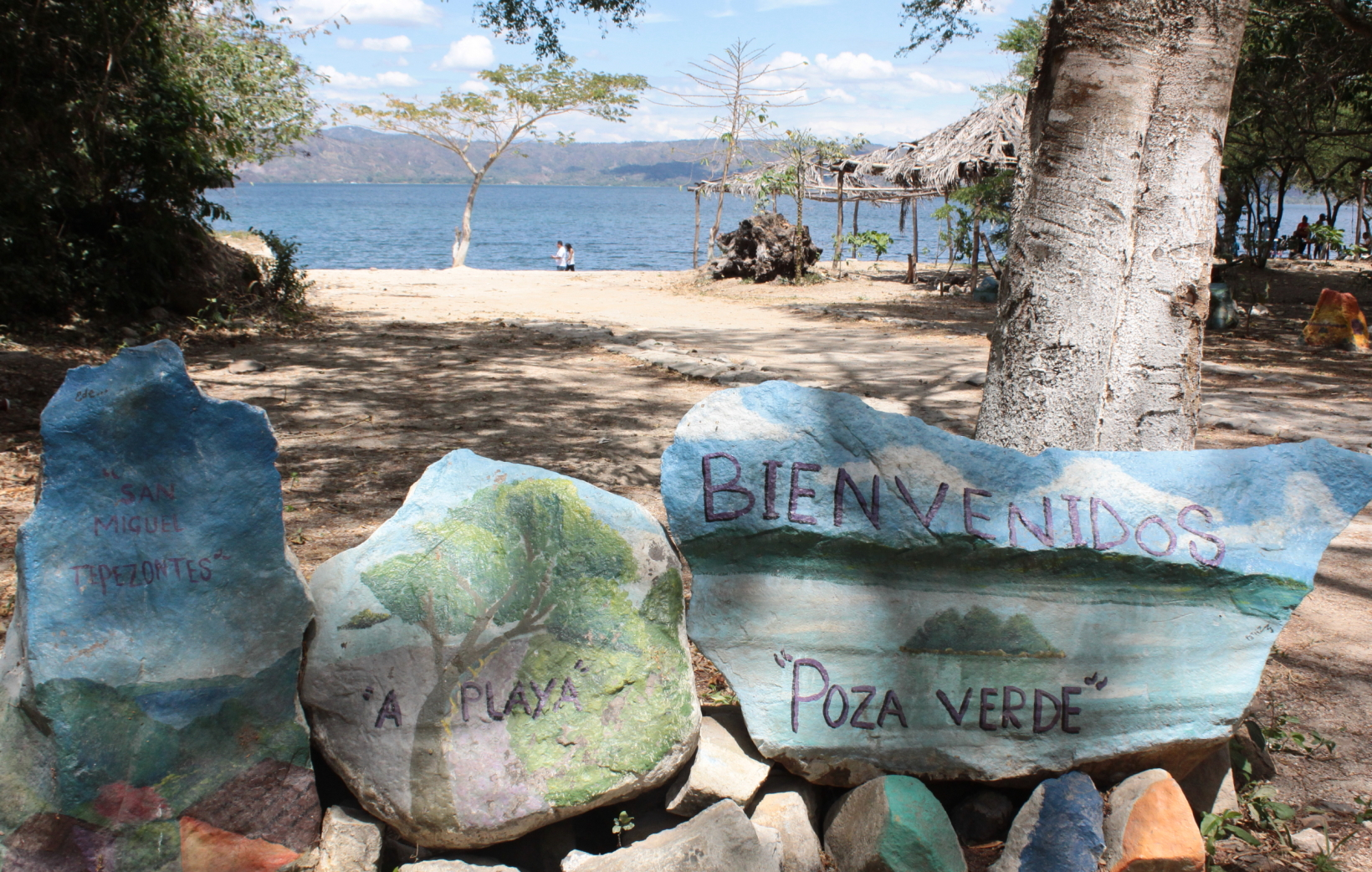 Entrada a playa Poza Verde. Costa del lago de Ilopango que pertenece a la jurisdicción de San Miguel Tepezontes. Fotografía por: Hugo Henriquez Entrance to Poza Verde beach. Coast of the lake of Ilopango that belongs to the jurisdiction of San Miguel Tepezontes.